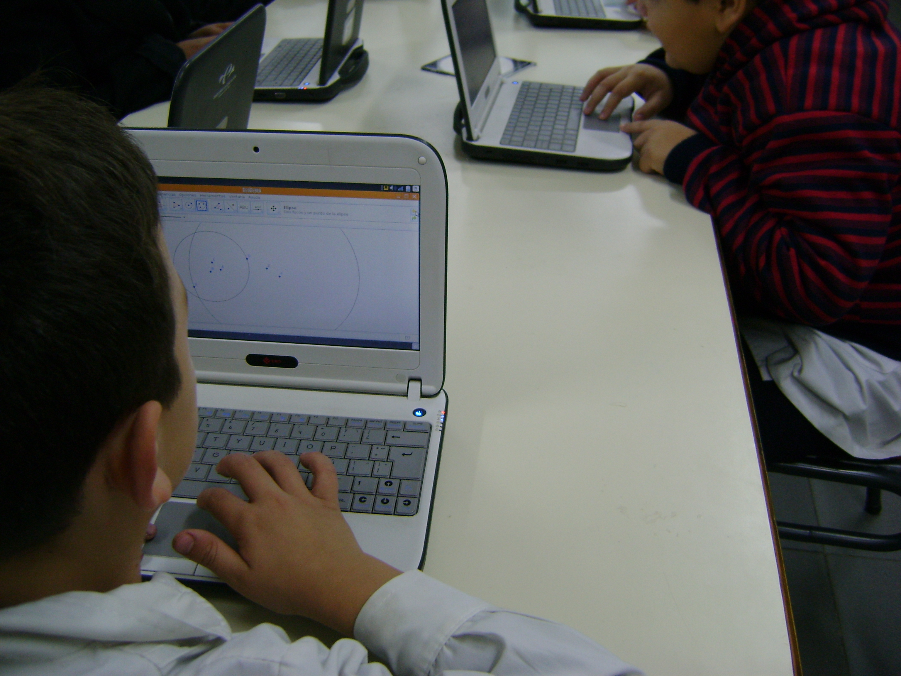 primia digital Argentina, uso de netbook